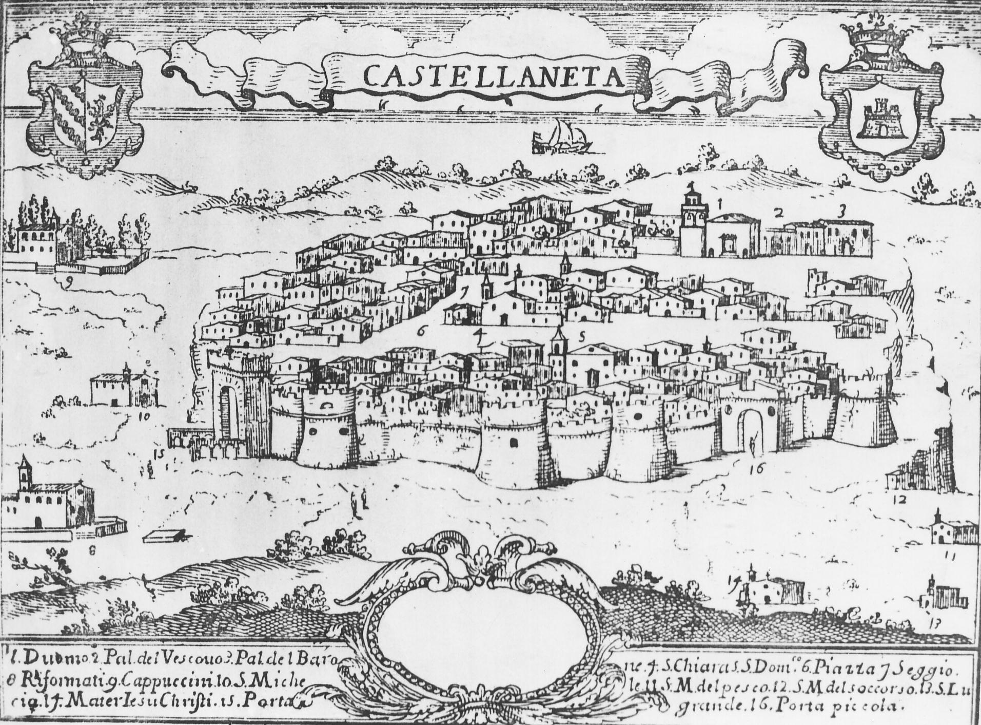 Cartografia storica di Castellaneta - Particolare della mappa che raffigura il territorio di Castellaneta.